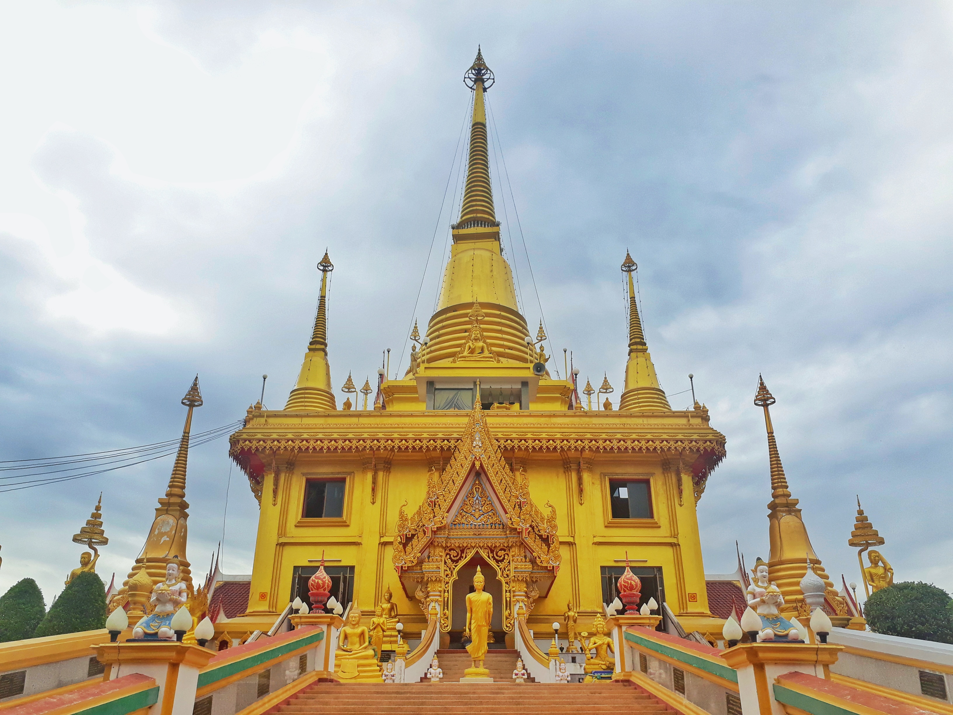 พระจุฬามณีเจดีย์ตั้งอยู่บนยอดเขาดาวดึงส์ วัดคีรีวงศ์ จังหวัดนครสวรรค์ 700000°N 100.140000°E (100°08′24″E / 15.700000°N 100.140000°E Thai Fine Art Department's link)